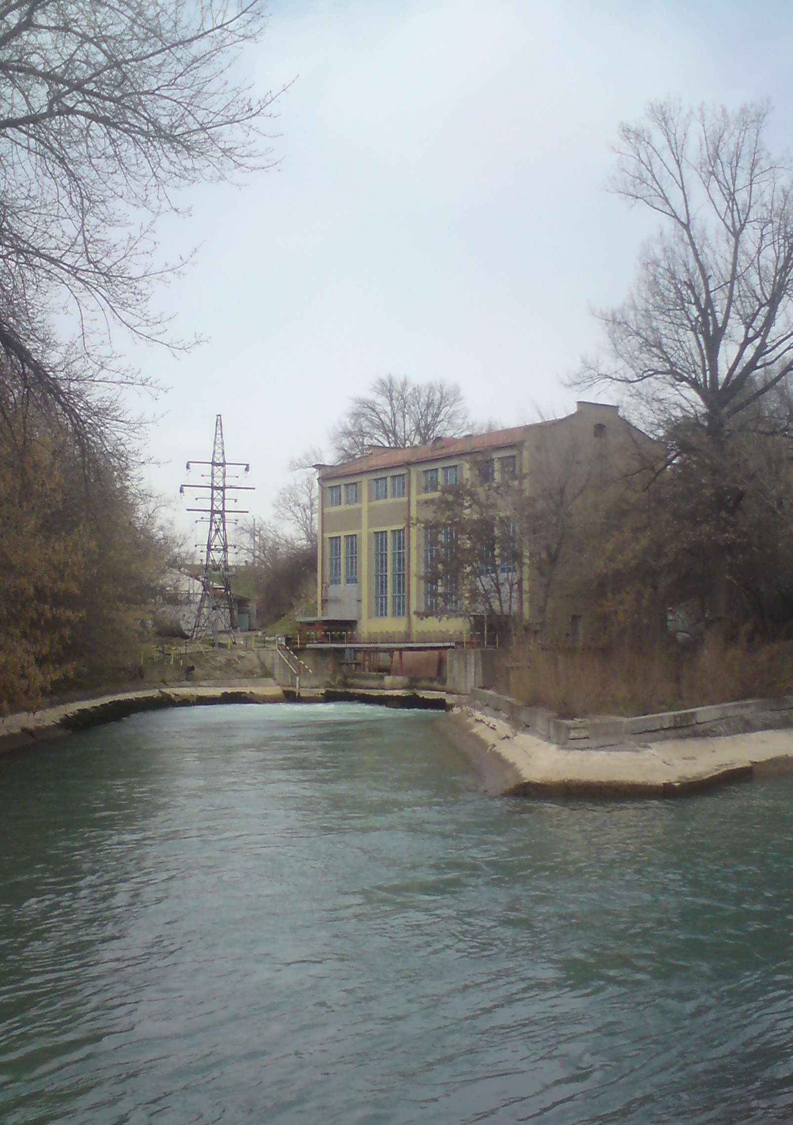 Нижний бьеф Бурджарской ГЭС на канале Бурджар (участок может рассматриваться как часть Бозсу), г. Ташкент